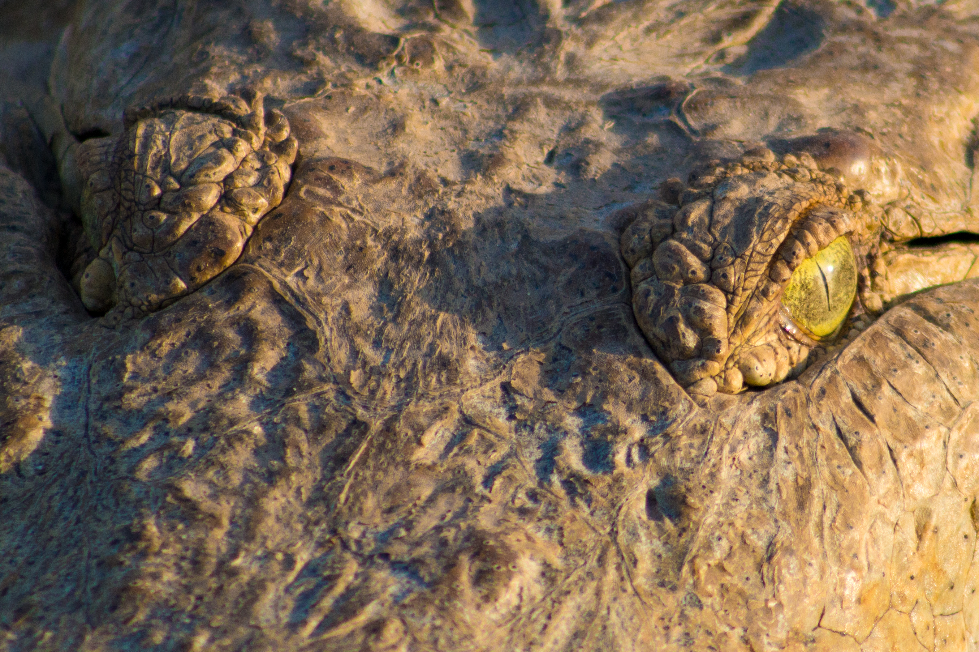 Orinoco crocodile | Cocodrilo del Orinoco (Crocodylus intermedius)